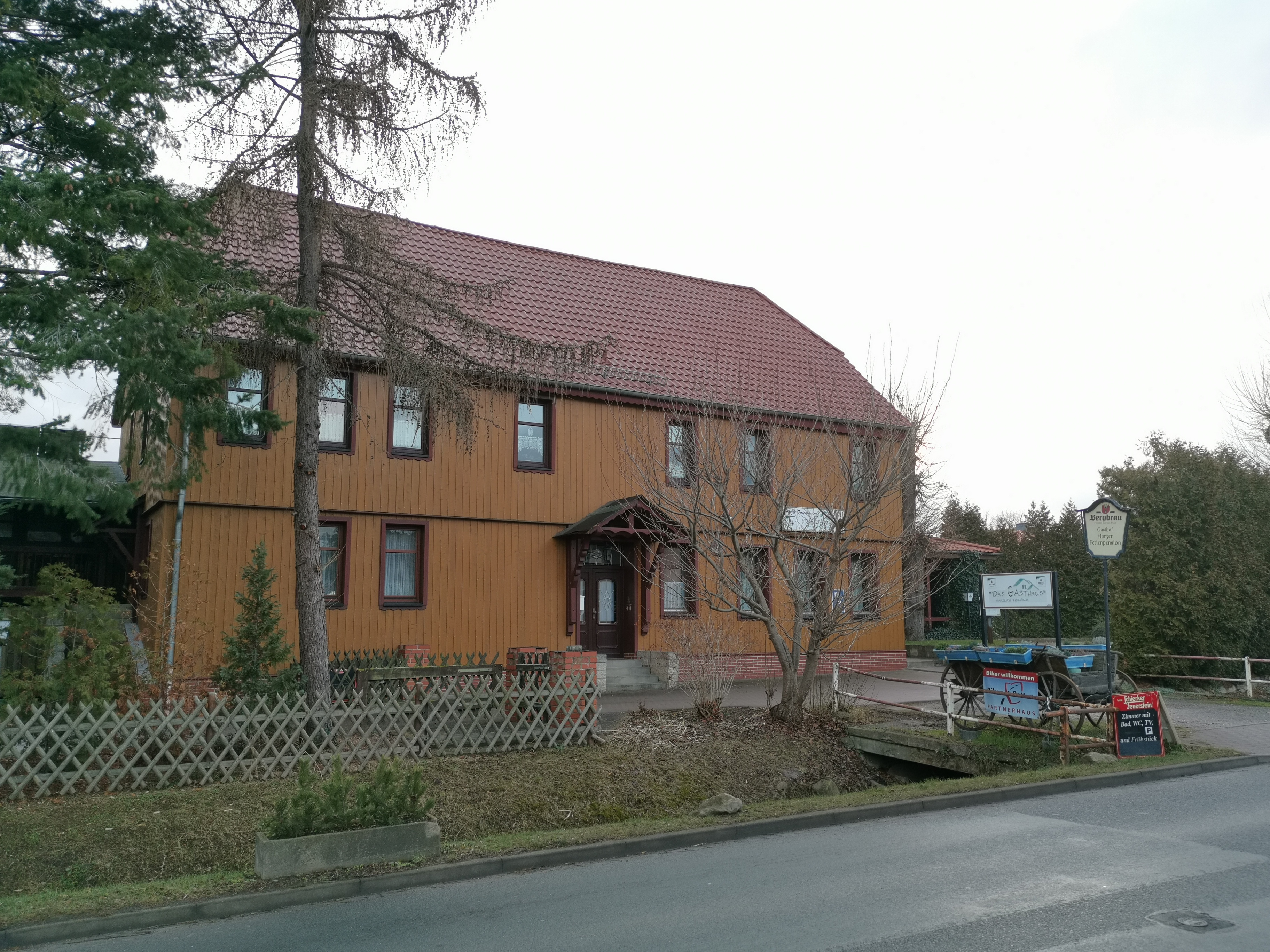 Blankenburger Straße 31 in Timmenrode